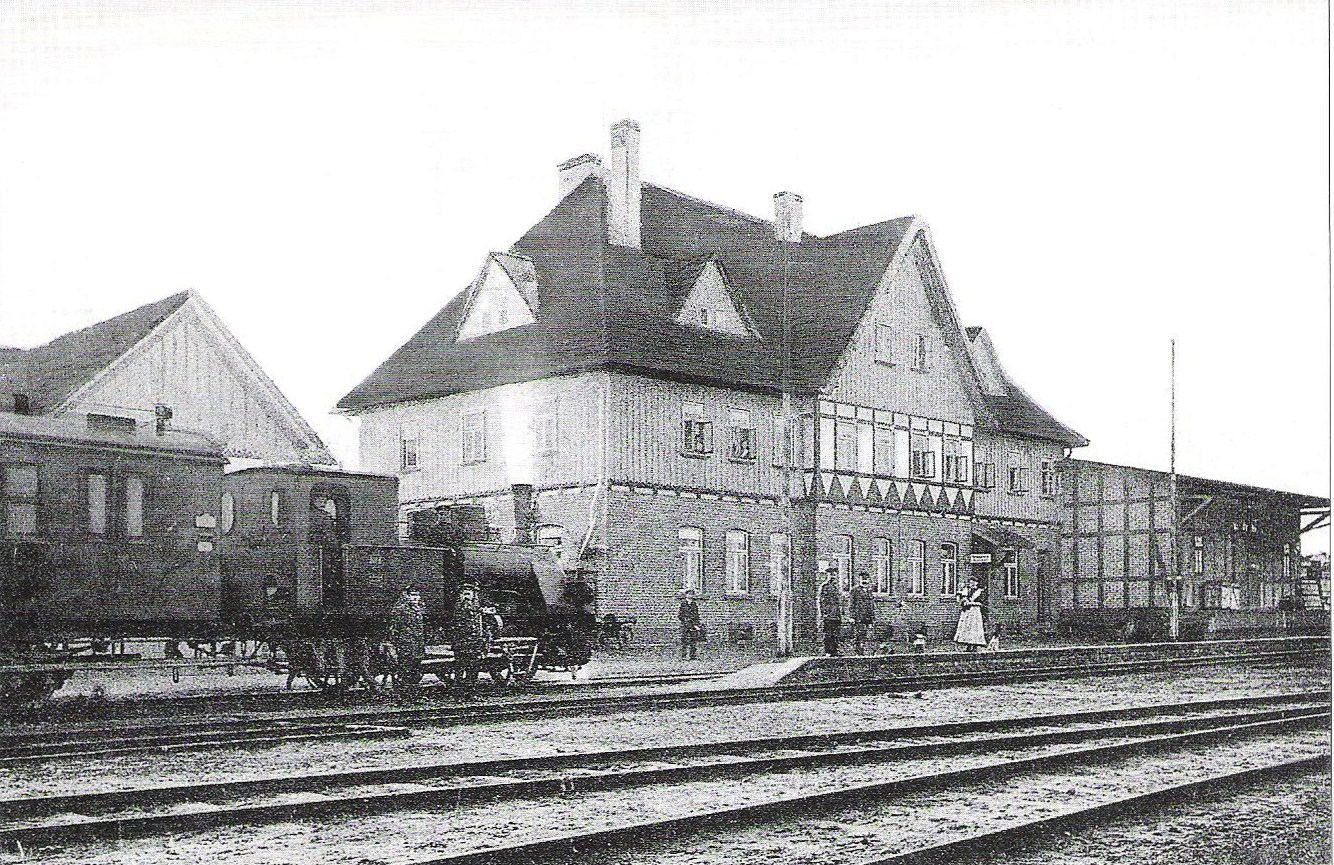 Der Bahnhof von Calvörde Aufnahme 1910